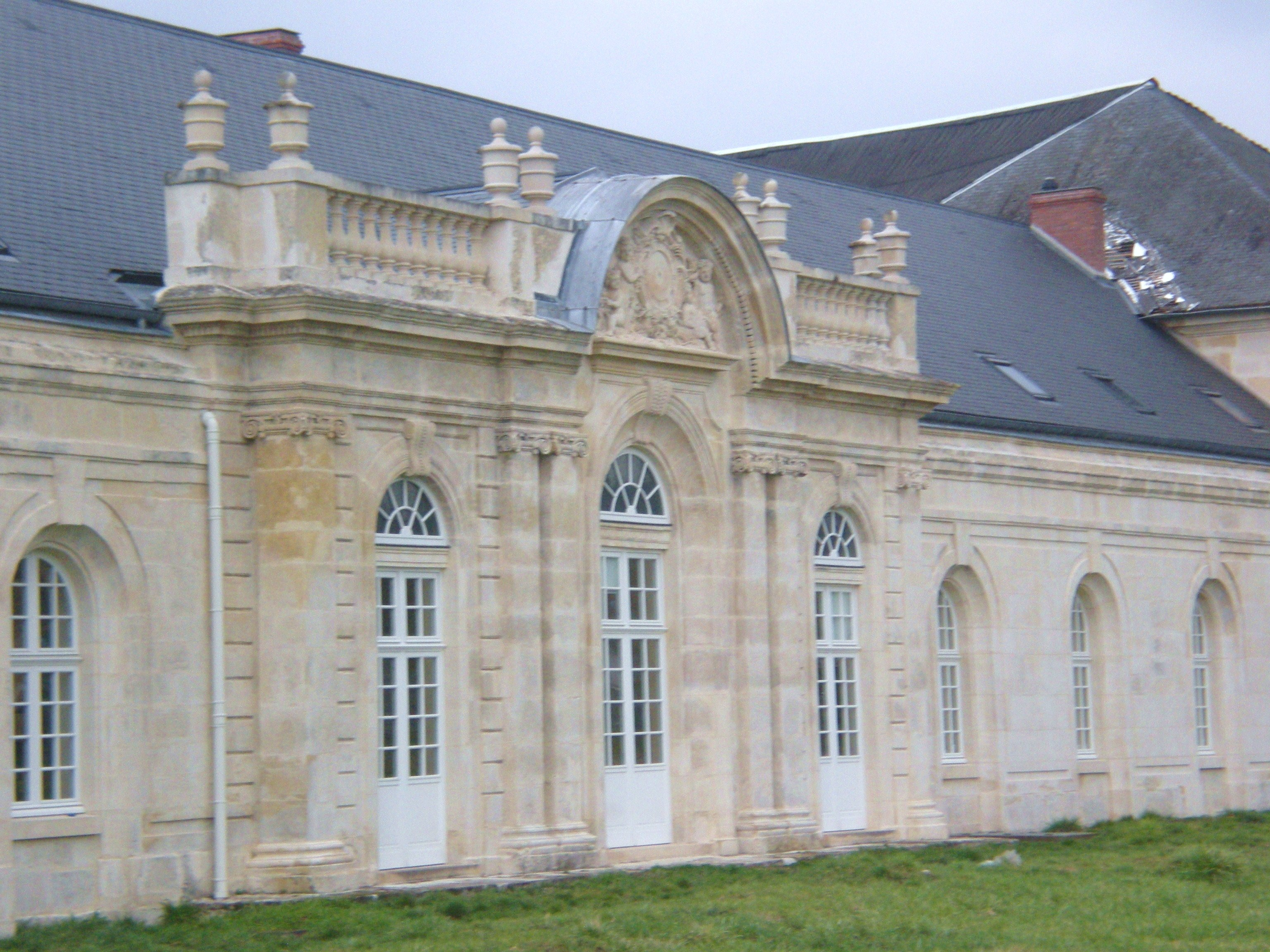 Détail de la façade des communs de l'ancien château de la Rochefoucauld